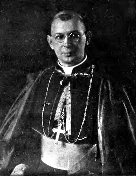 bp Franciszek Barda (przed 1934)